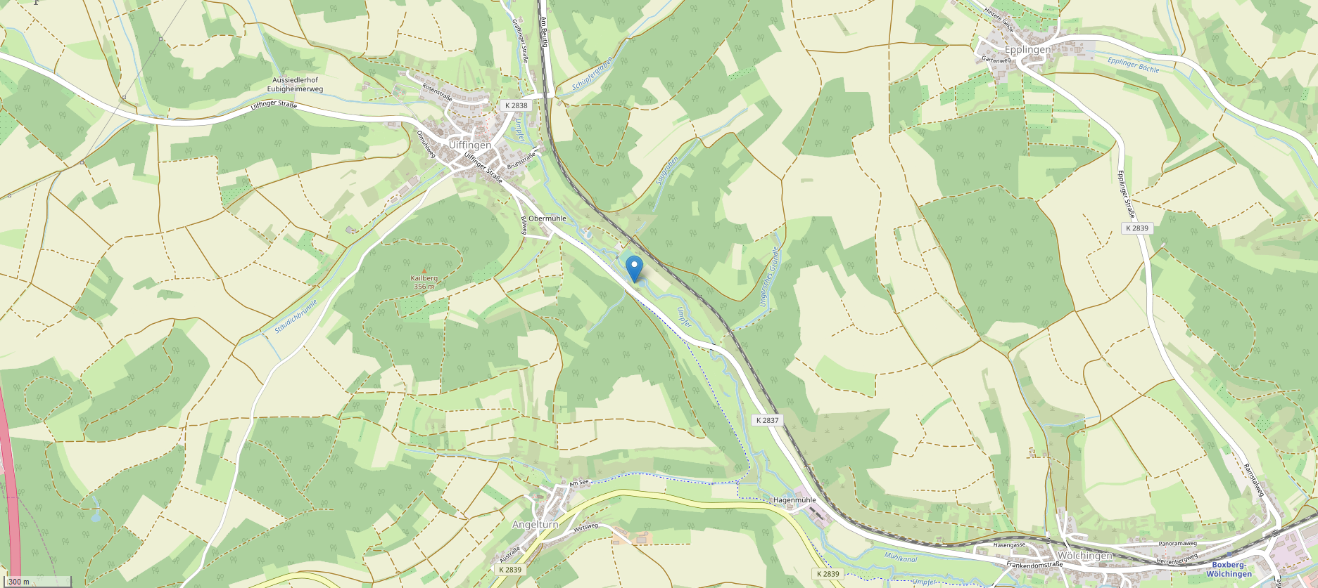 Lage des aufgegangenen Wohnplatzes Mittelmühle auf der Gemarkung von Uiffingen (Boxberg)